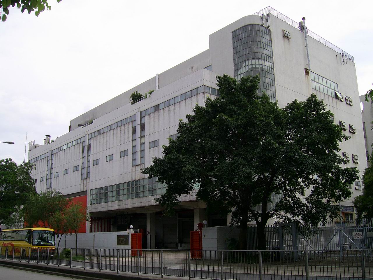 中文（香港）: 大埔工業園永南食品